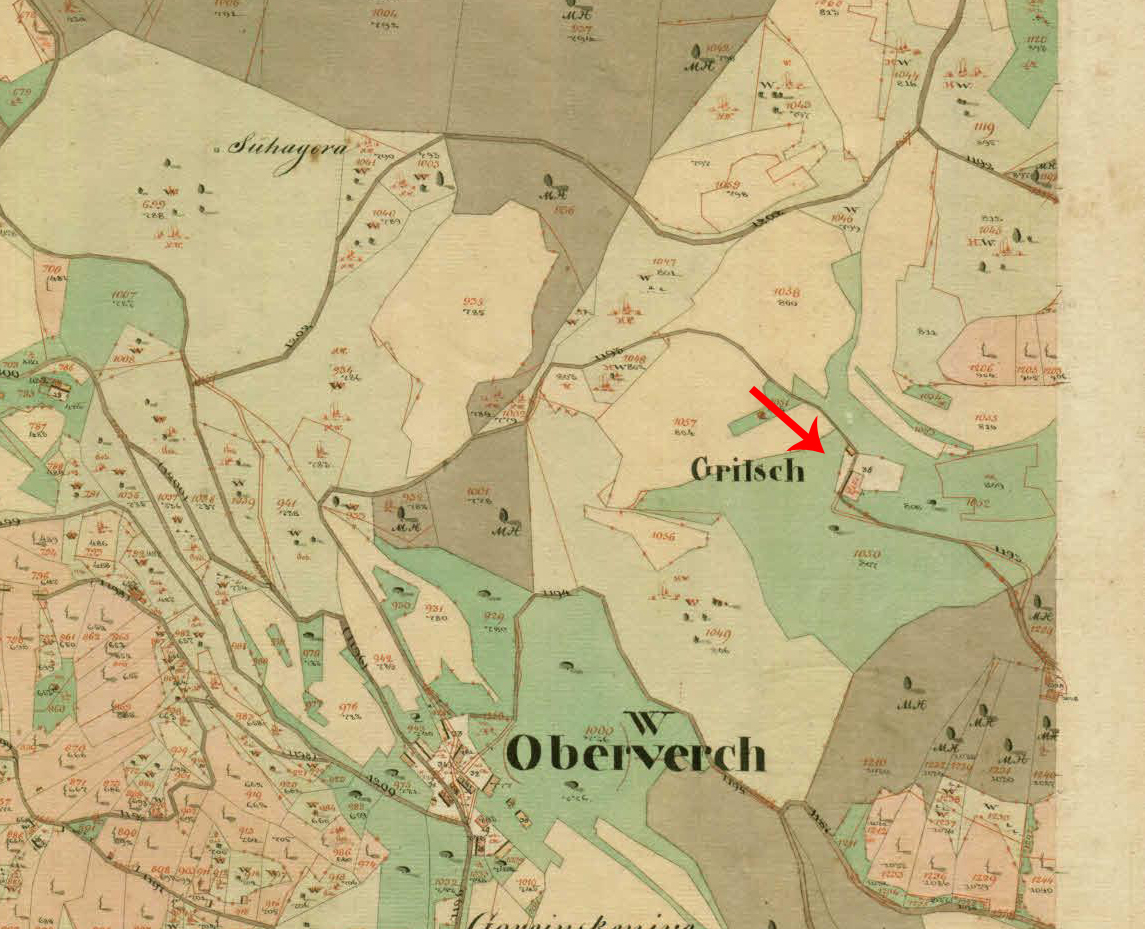 Franciscejski kataster za Kranjsko, 1823-1869